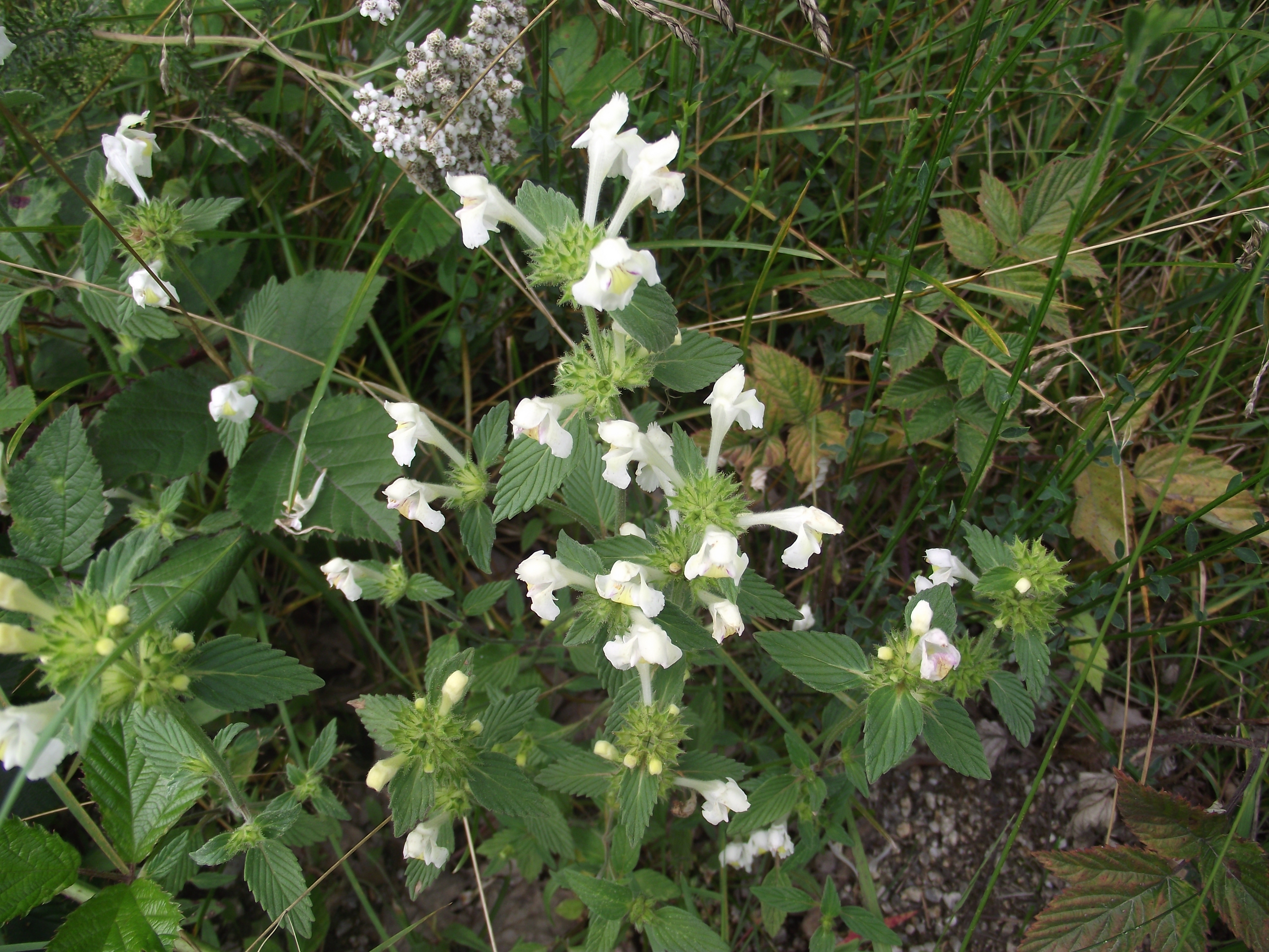 Galeopsis segetum. Monts d'Aubrac, Massif central, France.